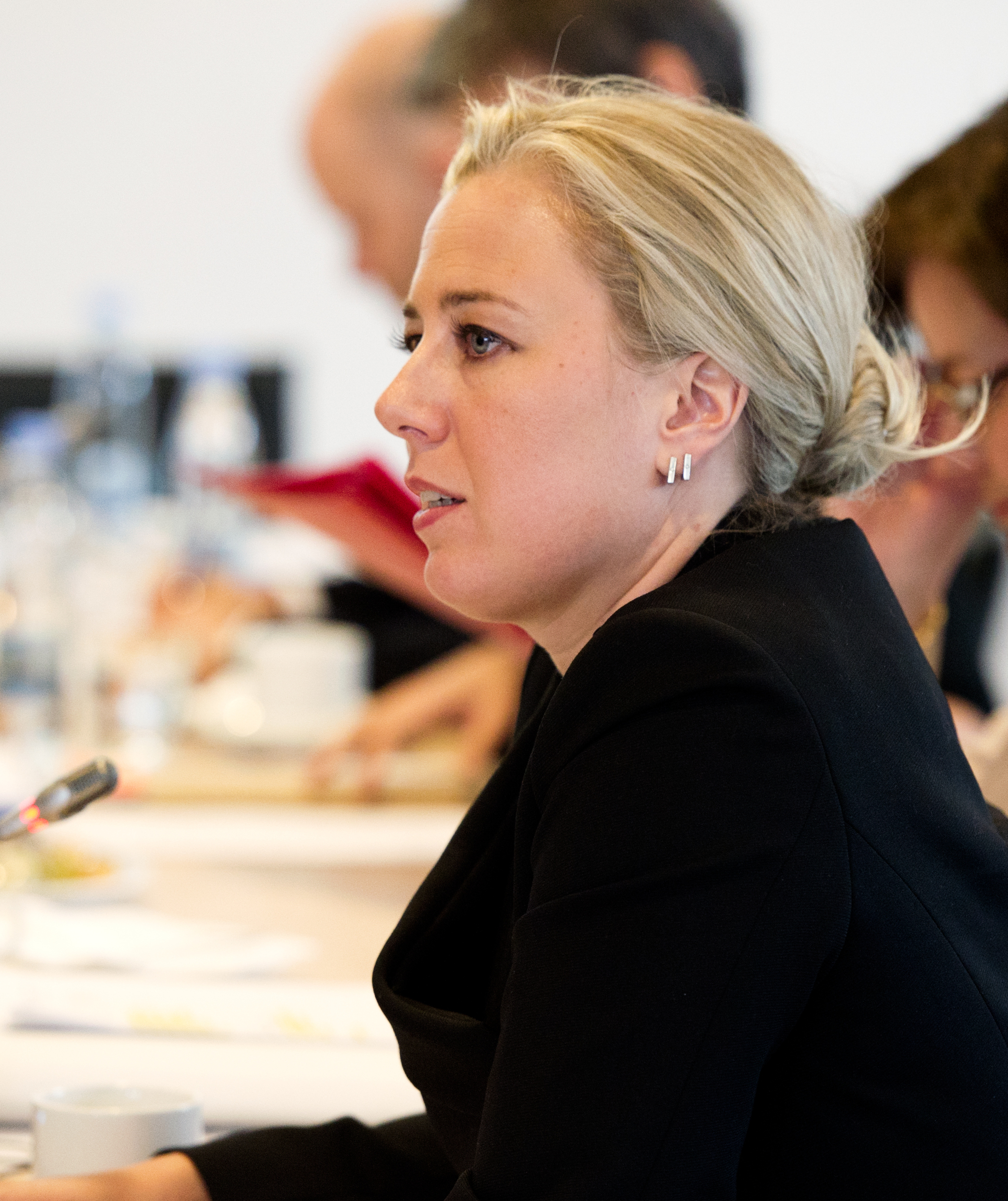 Finlands finansminister Jutta Urpilainen. Nordiska rådets session 2011 i Köpenhamn